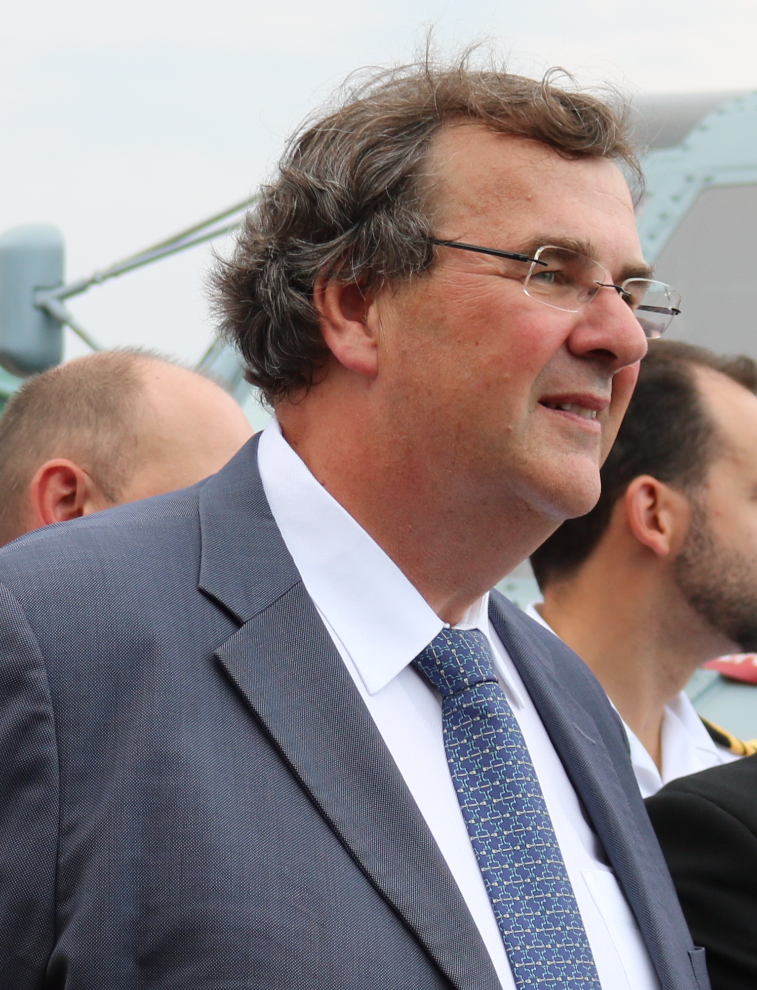 blais